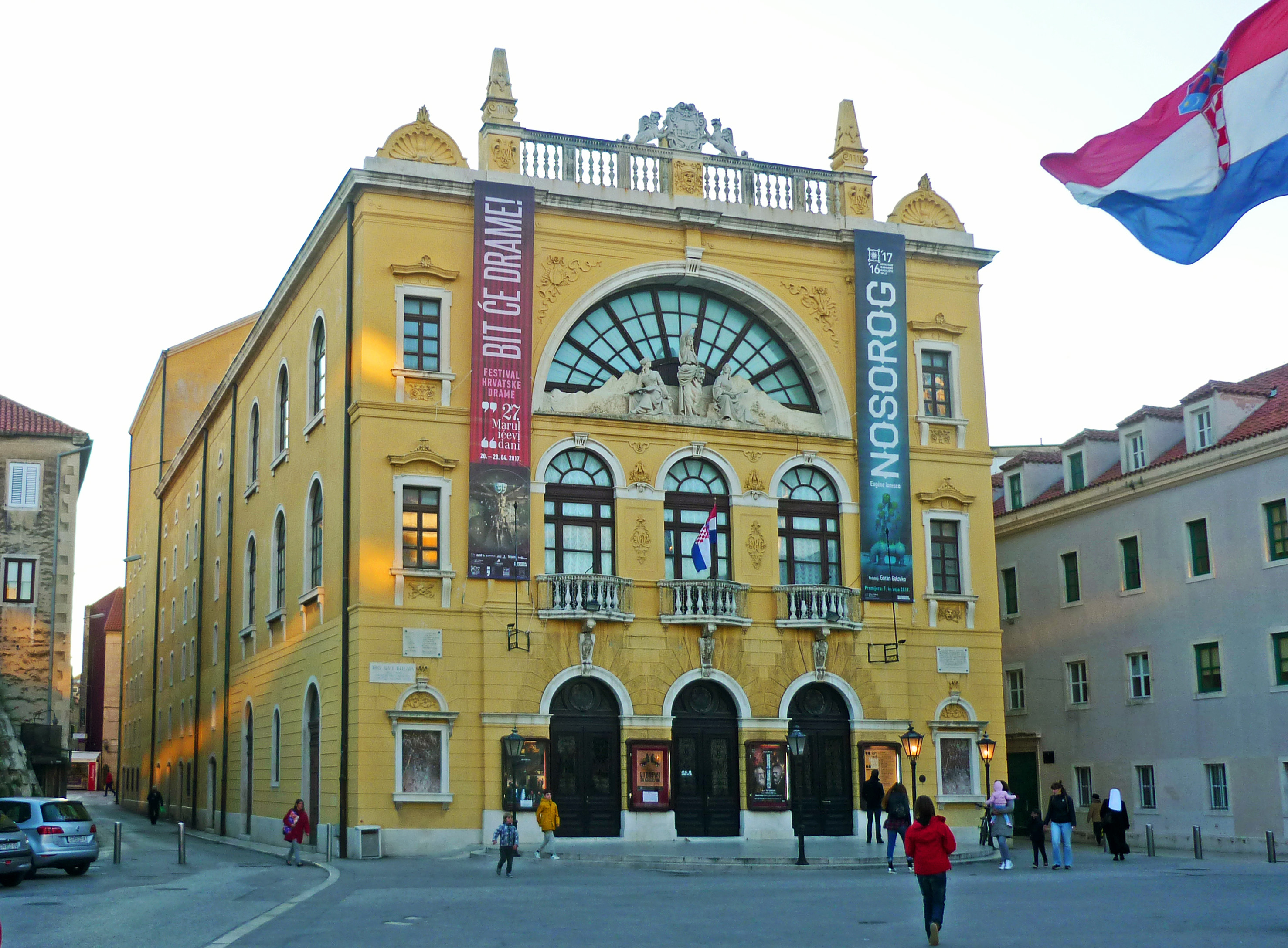 Nationaltheater in Split